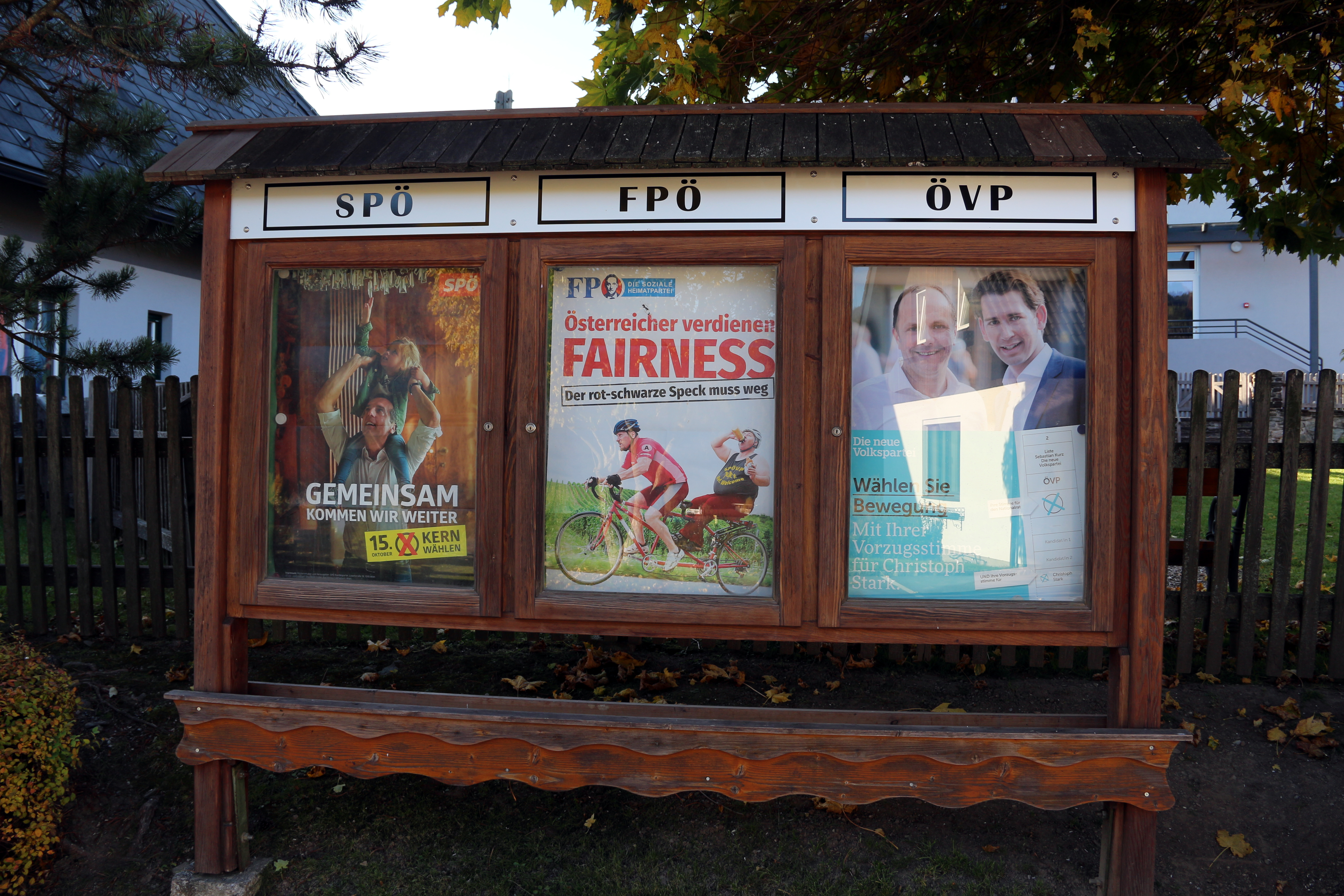 Plakate zur Nationalratswahl 2017 in Rettenegg, Steiermark.